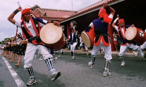 KI氏から版権譲渡された恩納村瀬良垣青年会のエイサーの写真